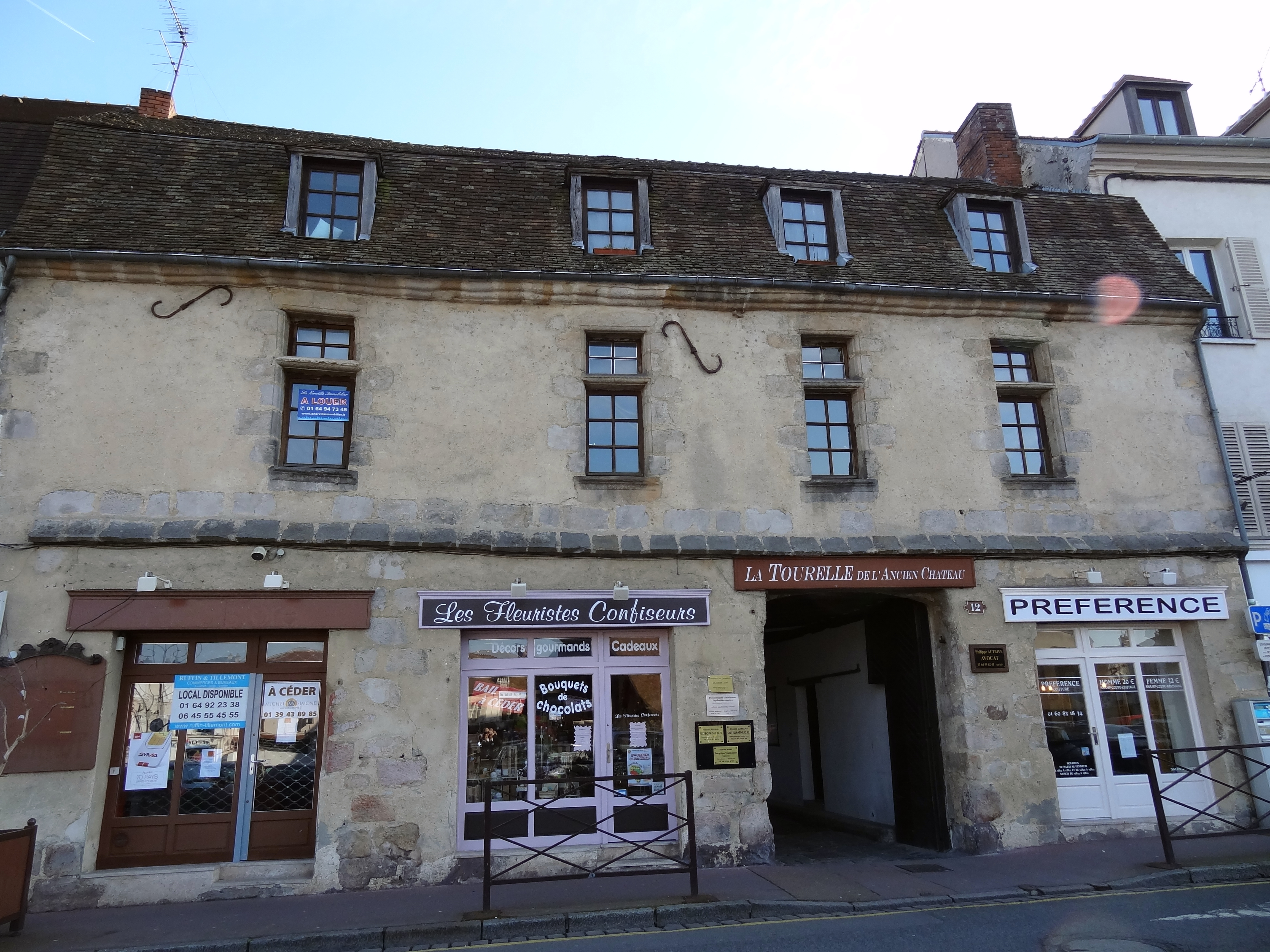 Maison du XVe siècle, 12 place du marché, Arpajon. La façade montre l'étage avec quatre fenêtre à menneaux au dessus d'un bandeau en grès. La toiture est recouverte de tuiles plates, mansardée et percée de quatre lucarnes.